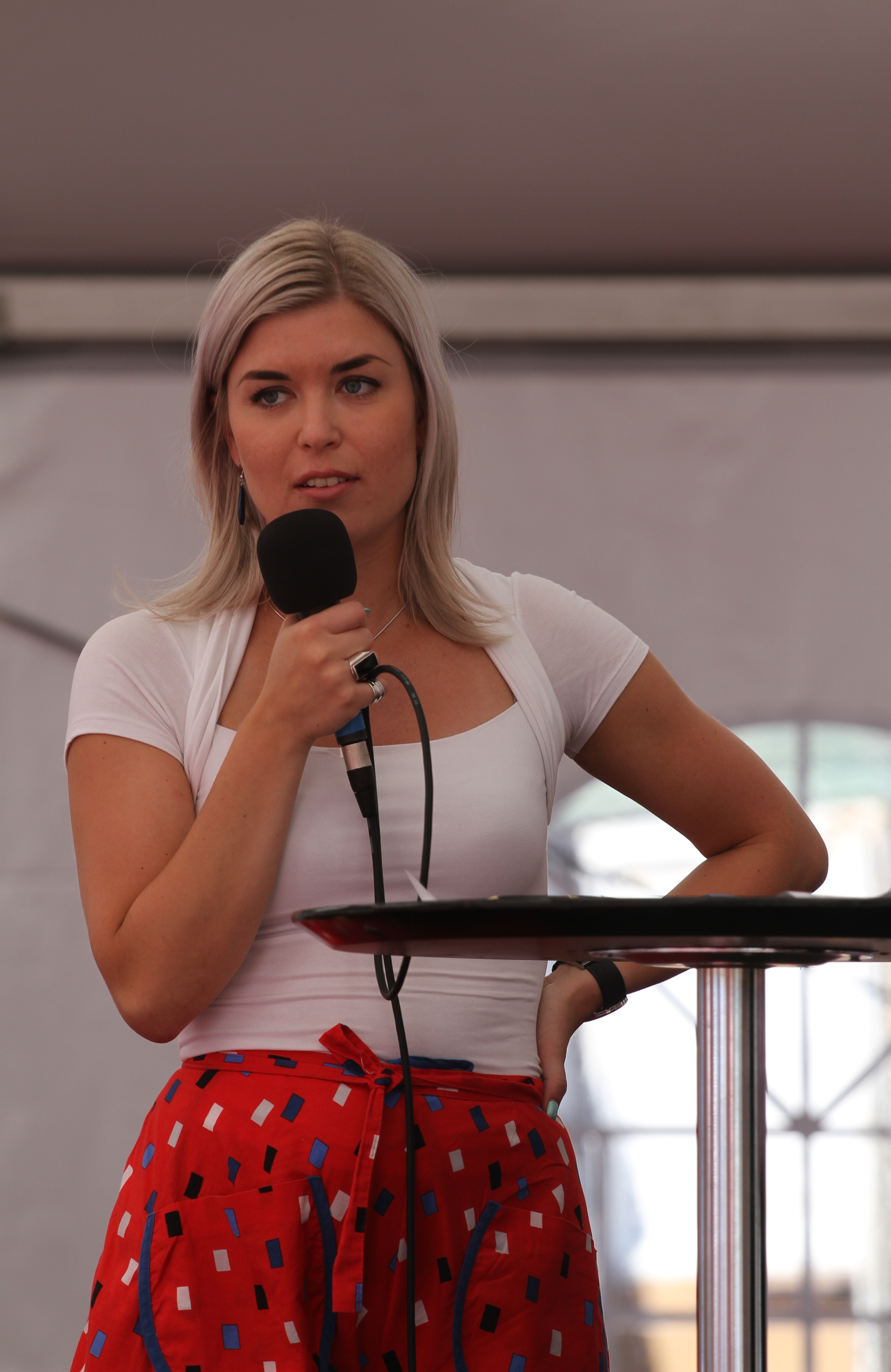 Kokoomusnuorten puheenjohtaja Susanna Koski Porissa 2014 Suomi Areena -tapahtumassa